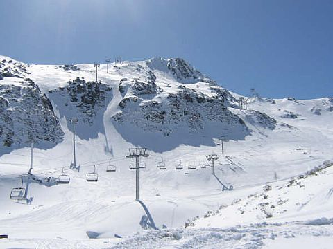 Estacion de Fuentes de Invierno